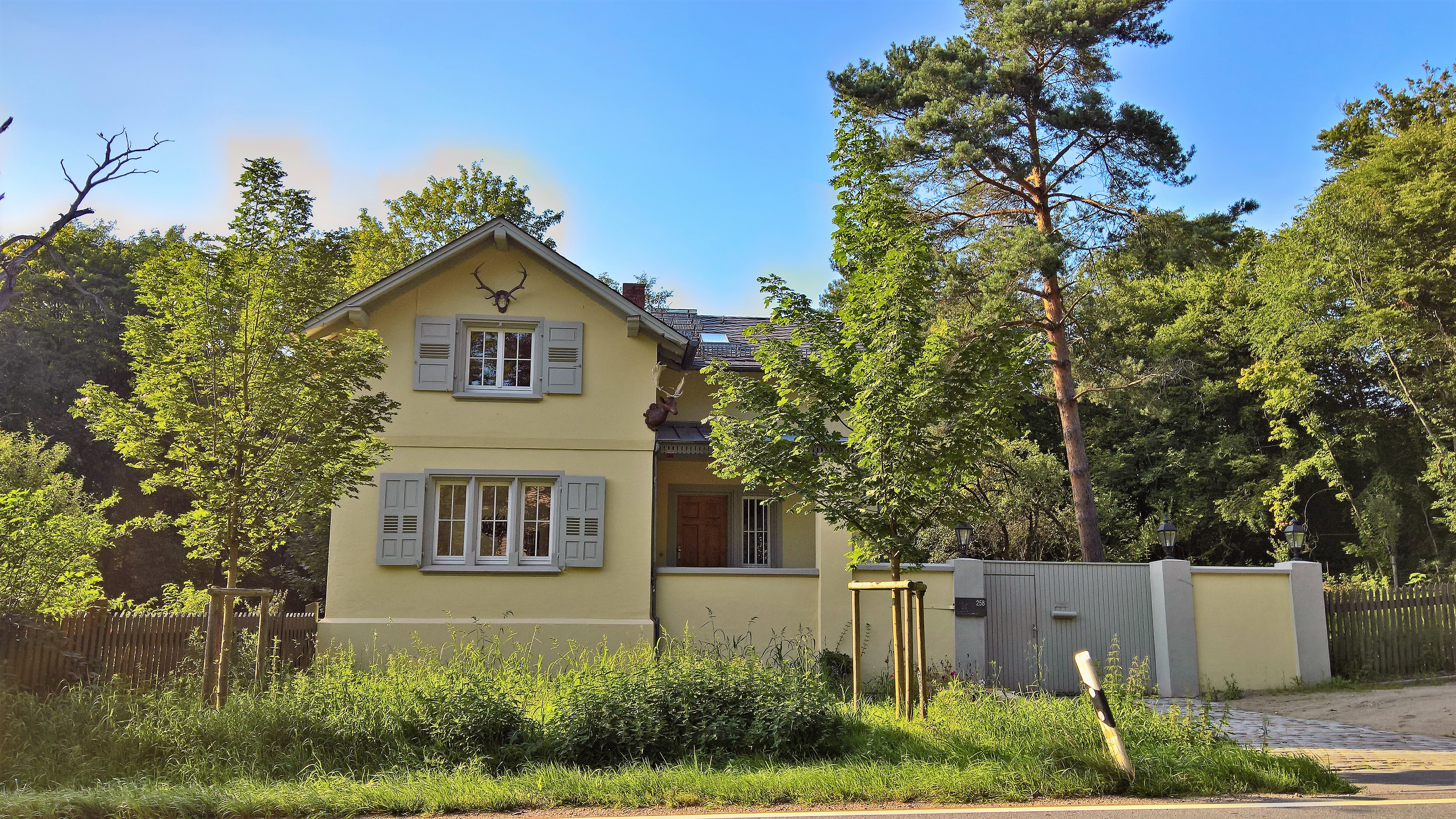 Das Forsthaus westlich des Kavaliersbaus des Jagdschlosses Kranichstein - Straßenansicht